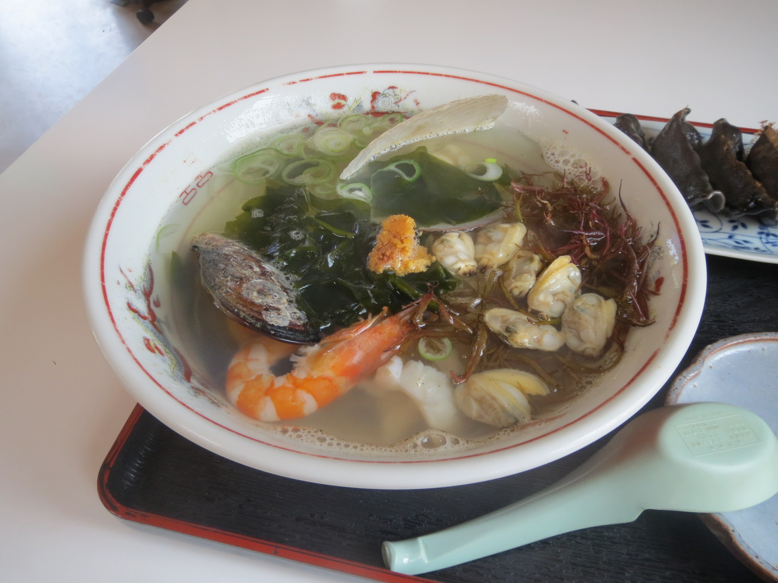 普代村で提供される磯ラーメン